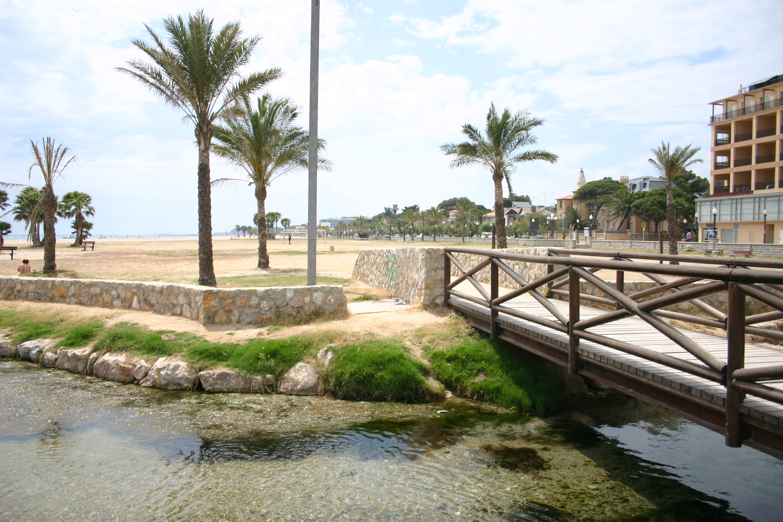 Riuet de Coma-ruga, Vendrell, Catalonia, Spain Google Maps